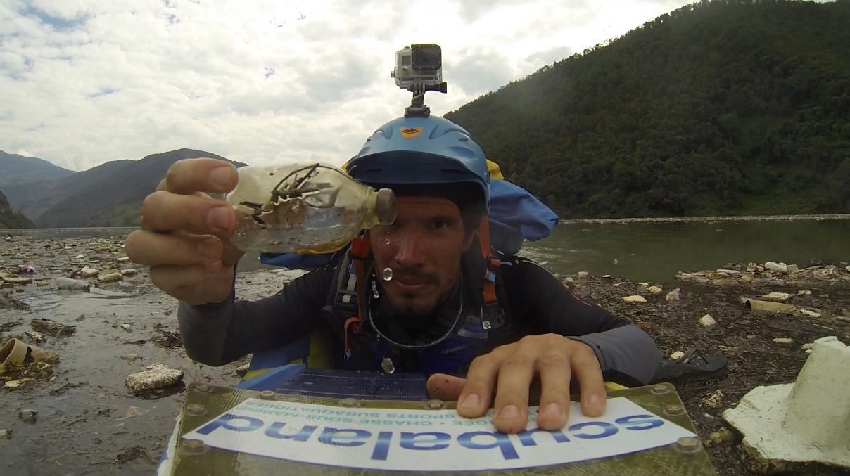 4400 km à la nage muni d'un hydrospeed pour aller rencontrer les populations locales qui bordent le fleuve afin de comprendre leur mode de vie atour de l'eau.